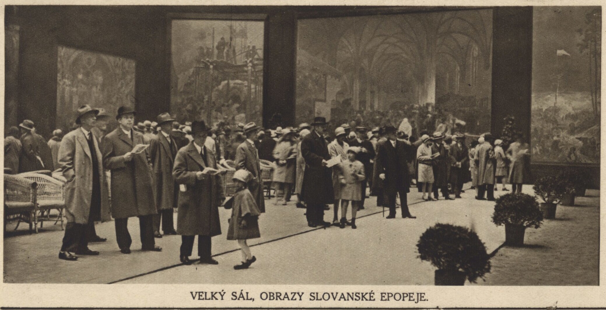 Veletržní palác Praha, 1928, první vystavení Slovanské epopeje